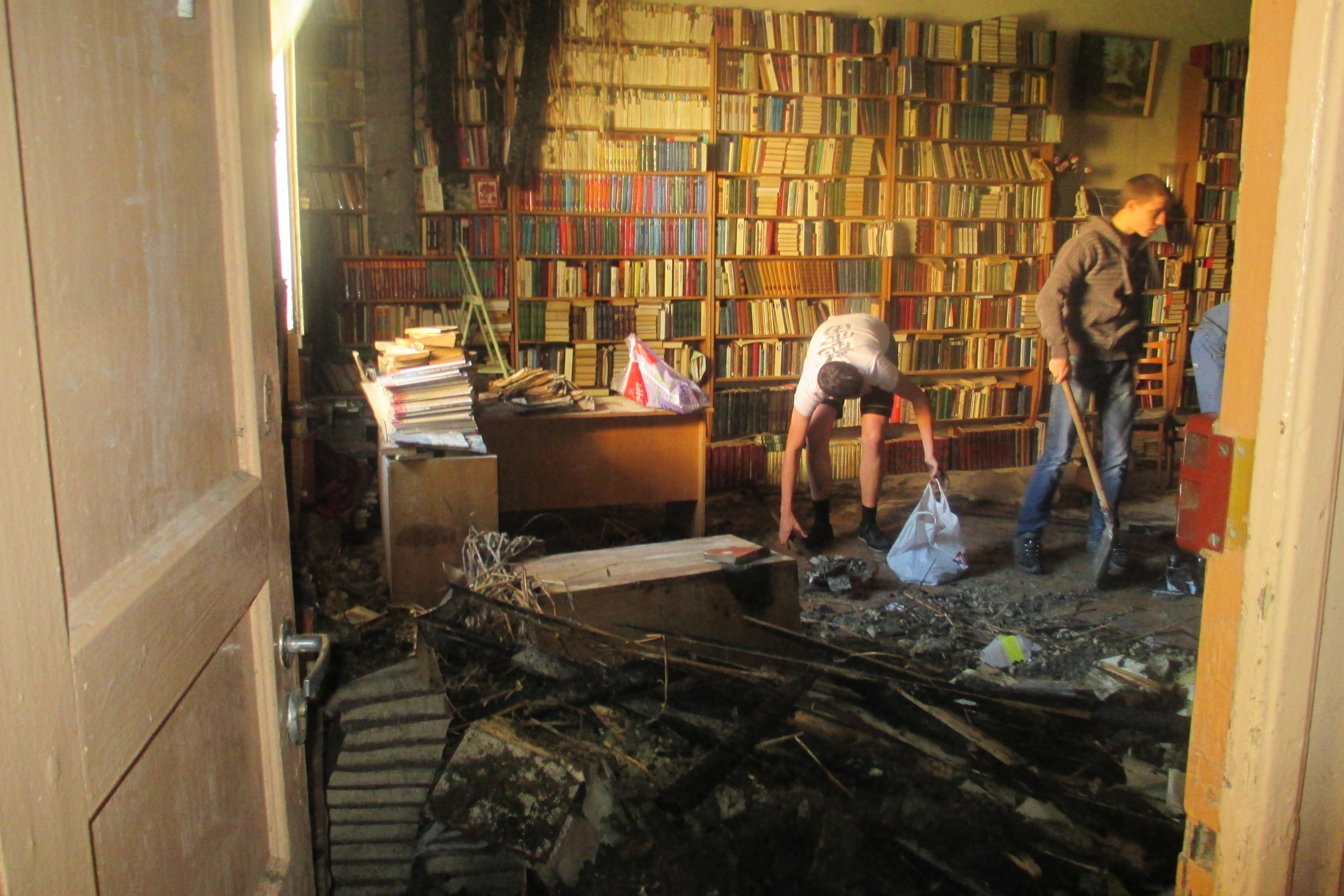 Последствия майского пожара в РКЦ (2014)